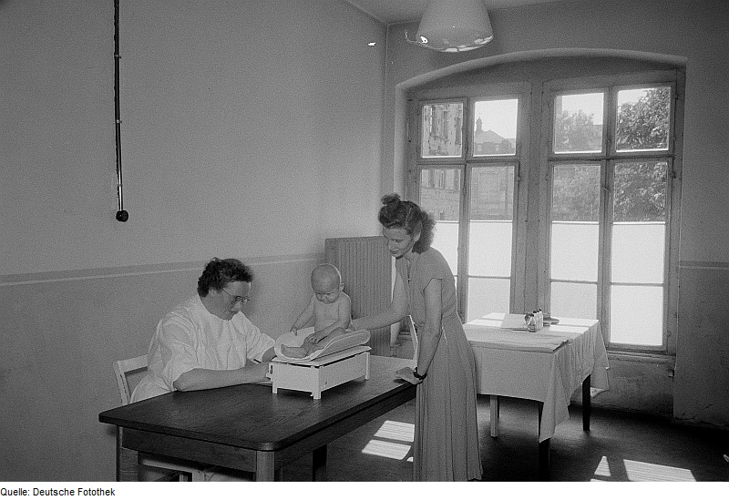 Original image description from the Deutsche FotothekEin Säugling wird auf einer Babywage gewogen